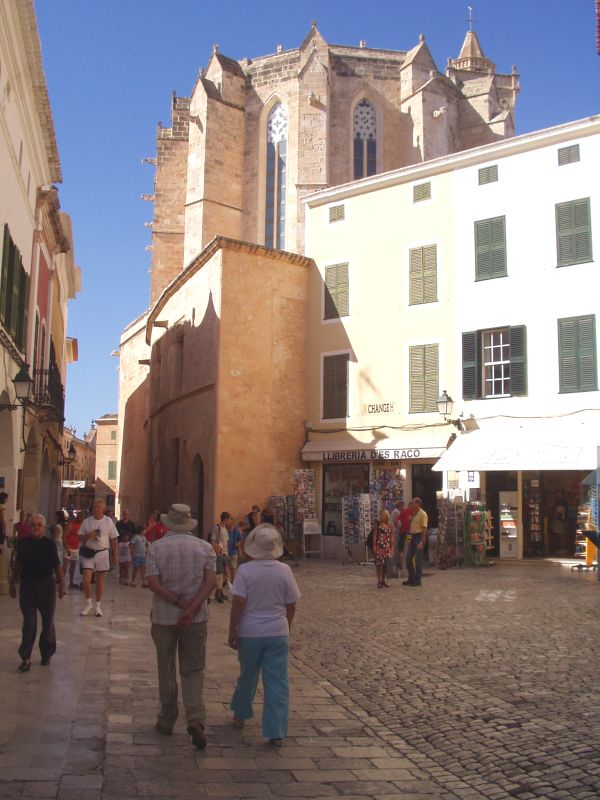 Menorca - Ciutadella (Spanien)